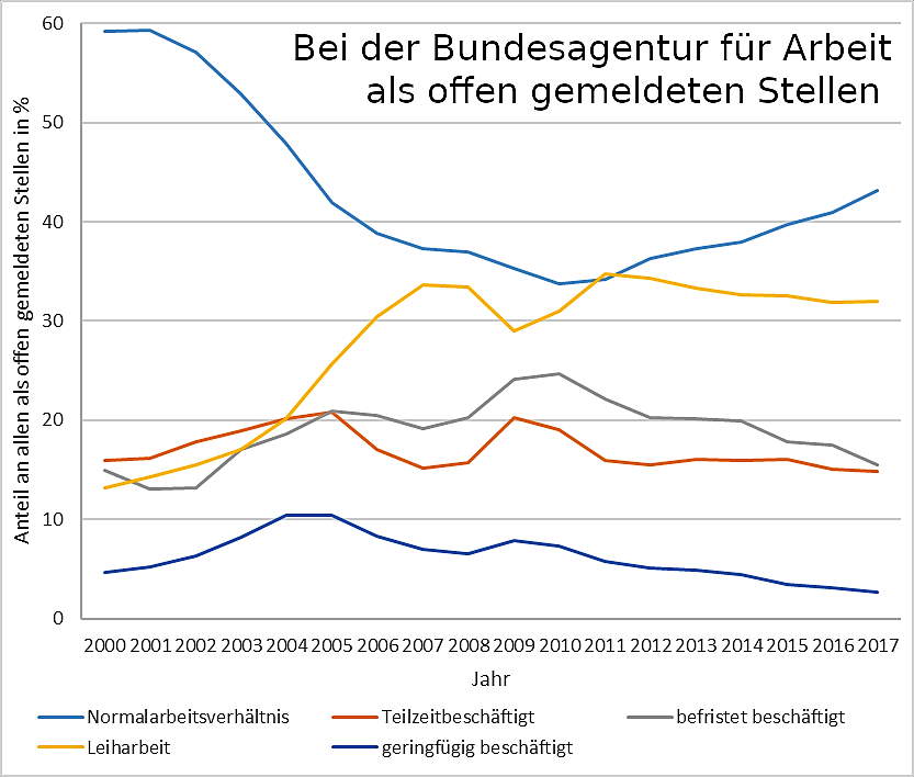 Basiernd auf Daten der BfA aus einer Kleinen Anfrage, 1940/46. Entwicklung atypischer Beschäftigungsformen im Vergleich zu Normalbeschäftigung anhand bei der Bundesagentur für Arbeit als offen gemeldete Stellen